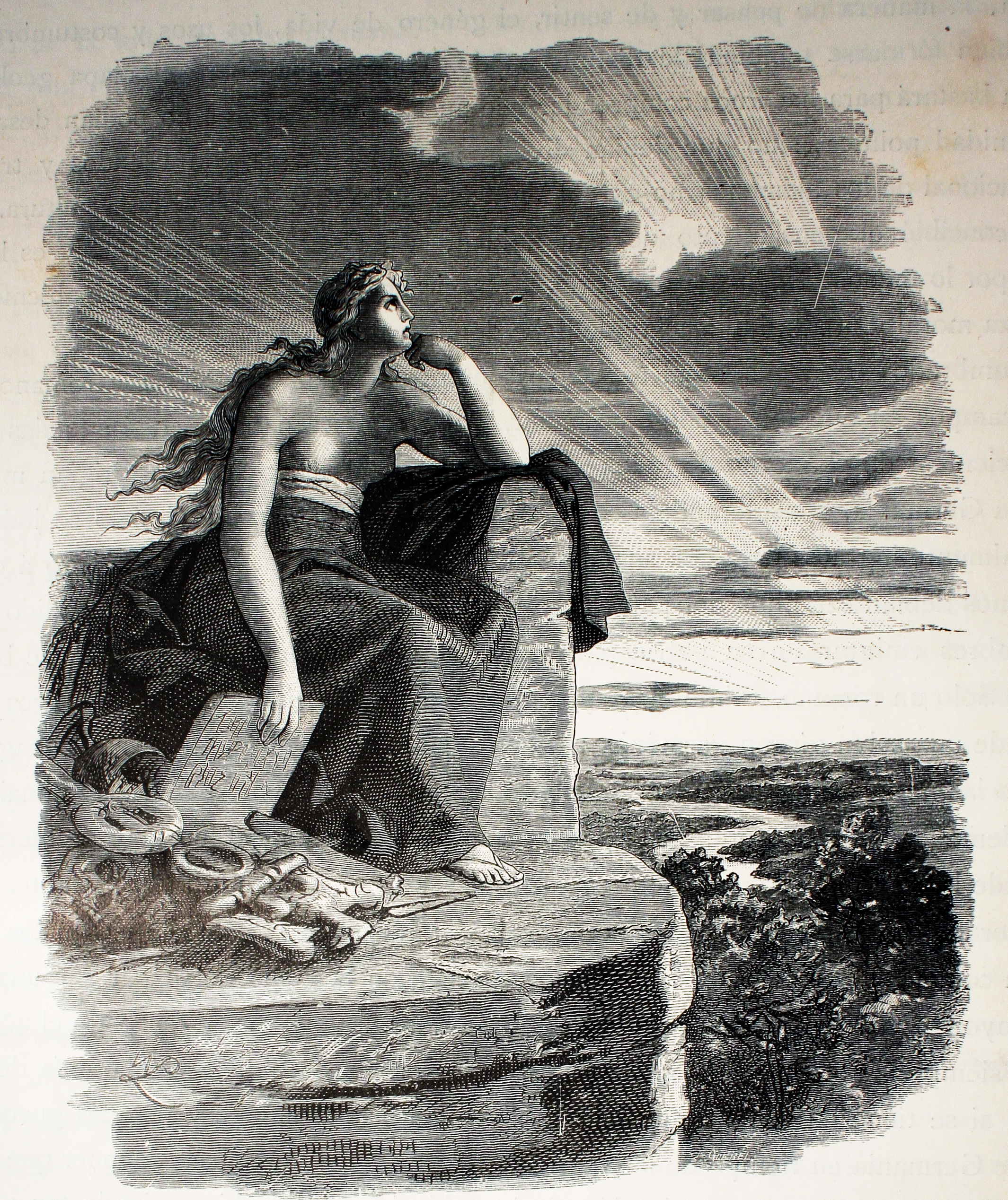 Ilustraciones de la obra : Germania : dos mil años de historia alemana / por Juan Scherr. - Barcelona : Montaner y Simón, 1882.